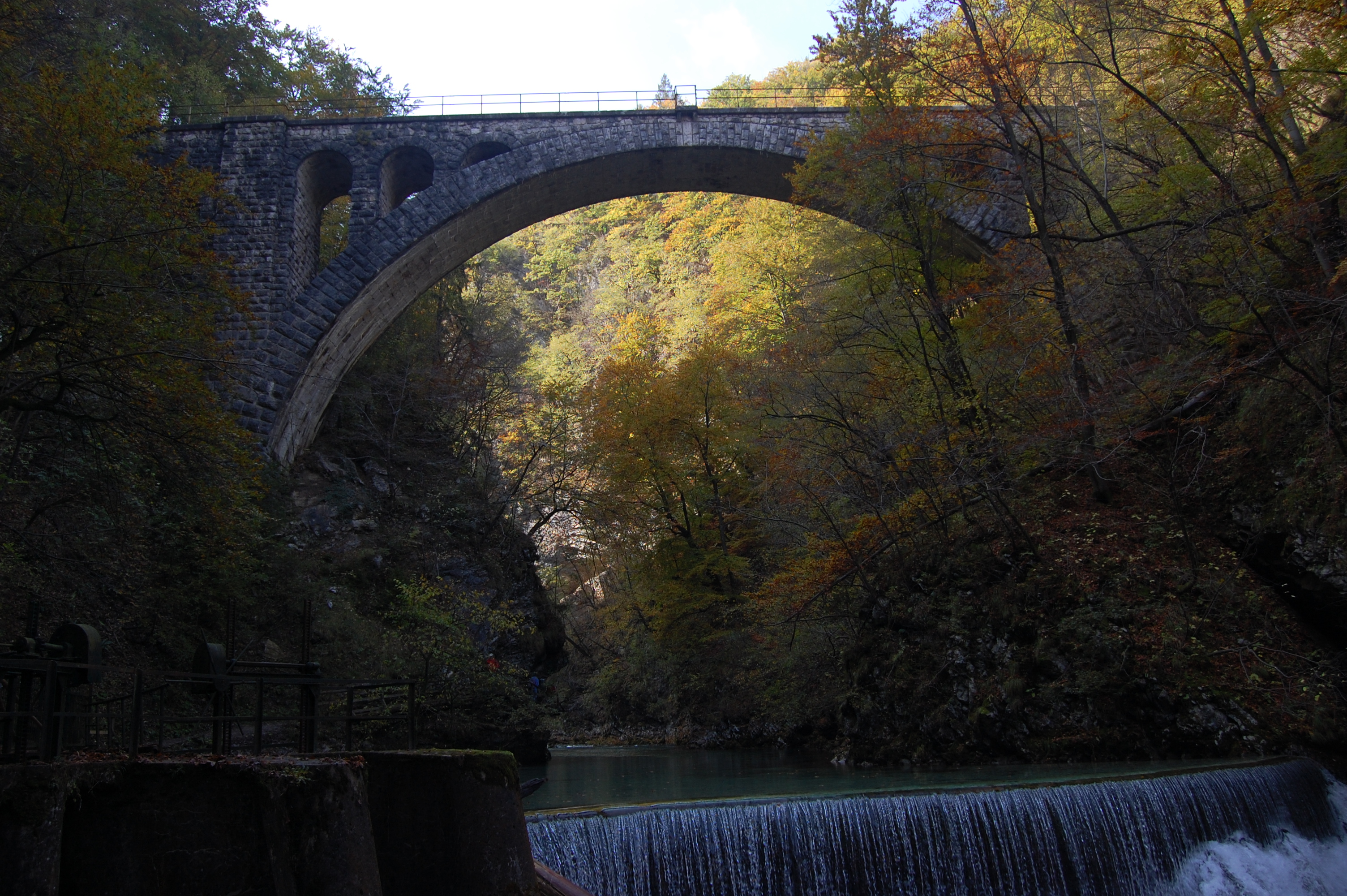 Blejski Vintgar. Taken in autumn 2007